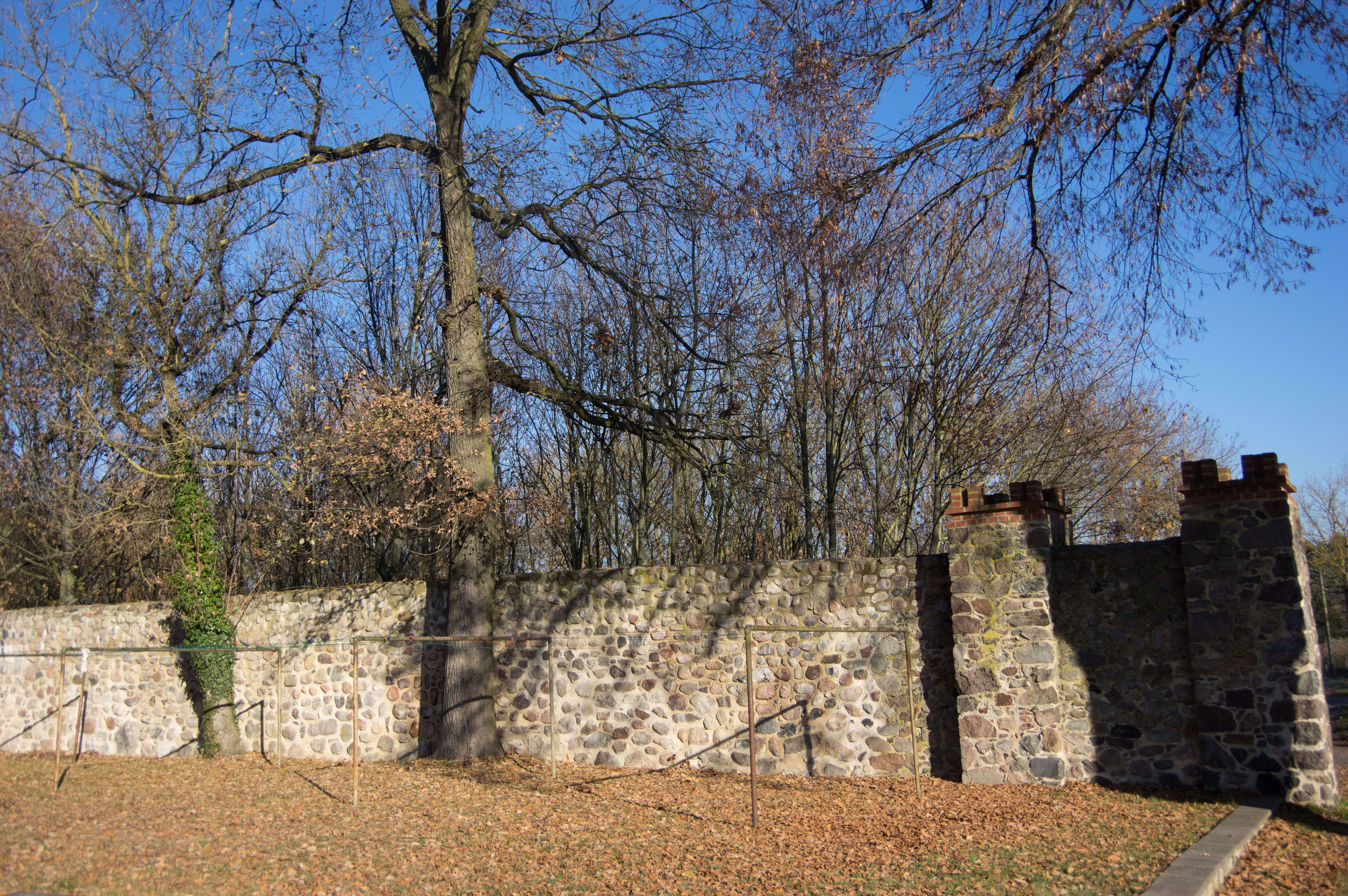 Müncheberg in Brandenburg. Die Stadtmauer ist denkmalgeschützt.